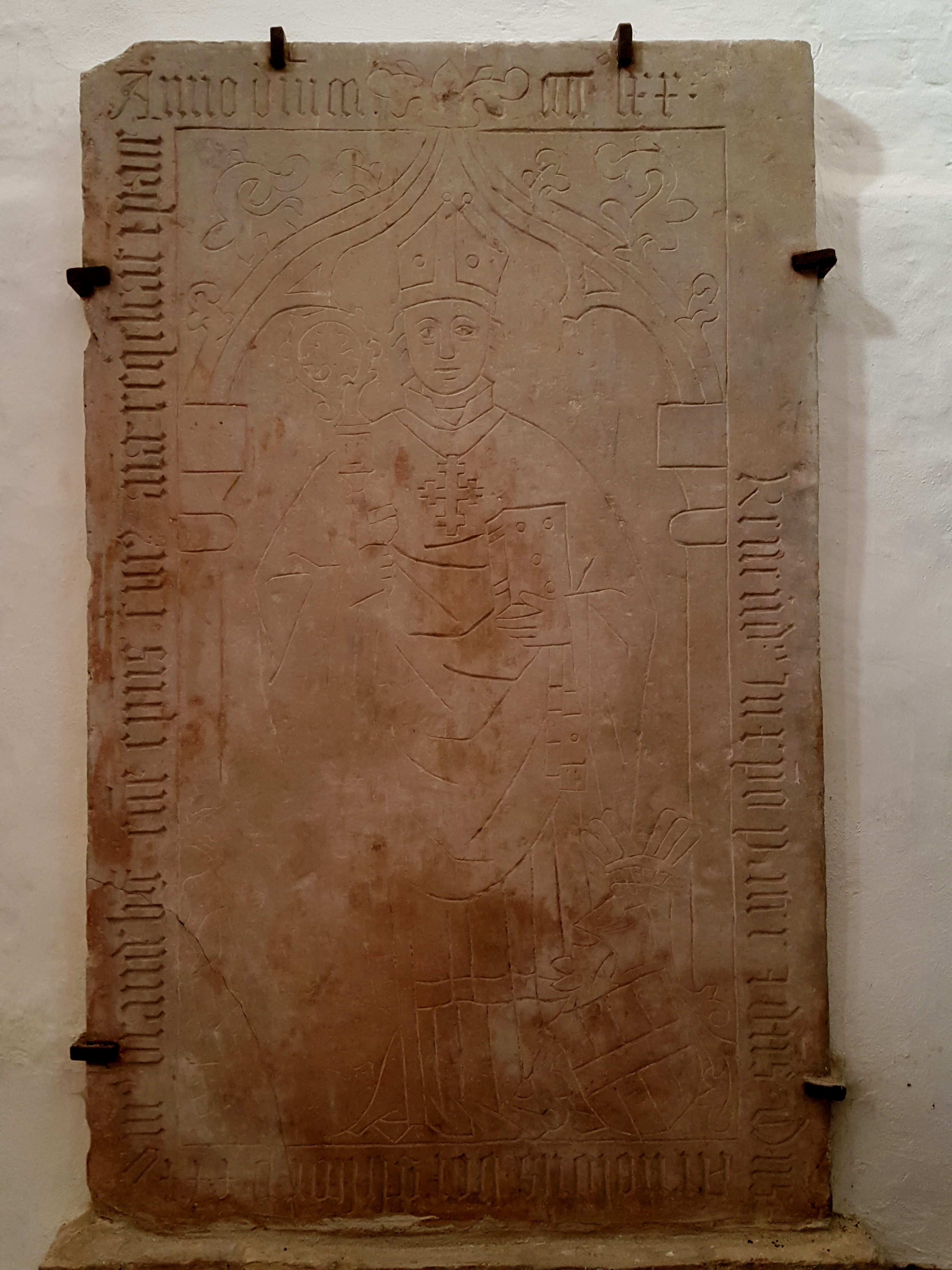 Grabplatte, Bischof Arnold von Burgsdorf, Dom zu Brandenburg, Künstler unbekannt